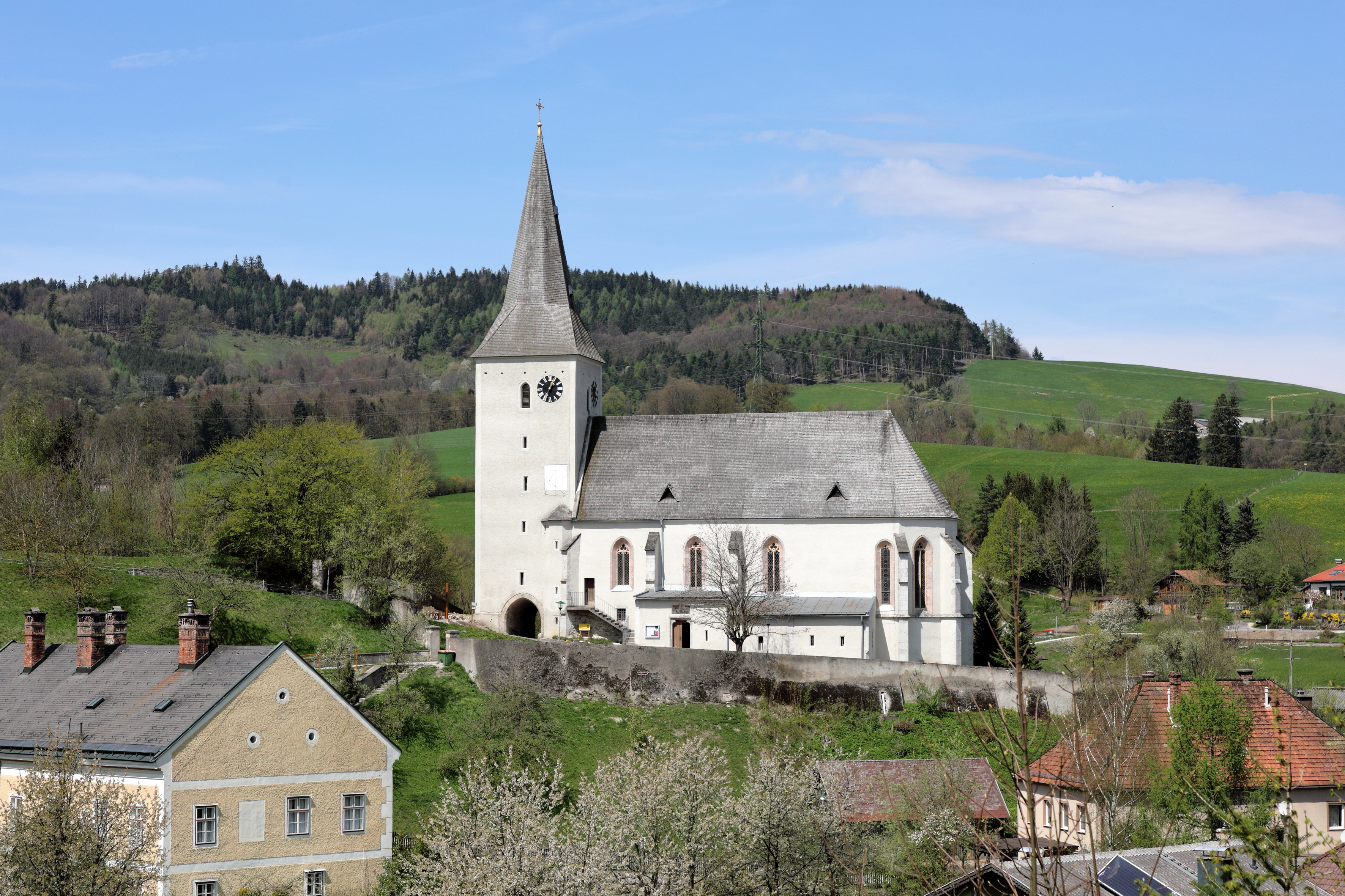 Südansicht der röm.-kath. Pfarrkirche hl. Michael in der niederösterreichischen Marktgemeinde Kaumberg. Eine in erhöhter Lage in mehreren Bauetappen errichtet gotische Saalkirche mit einem mächtigen spätgotischen Westturm (mit 1502 datiert) und die teilweise von einer Wehrmauer umgeben ist.